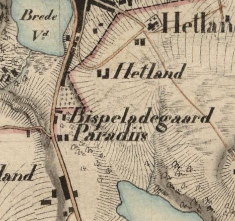 Kartutsnitt over Paradis i Stavanger i 1855.